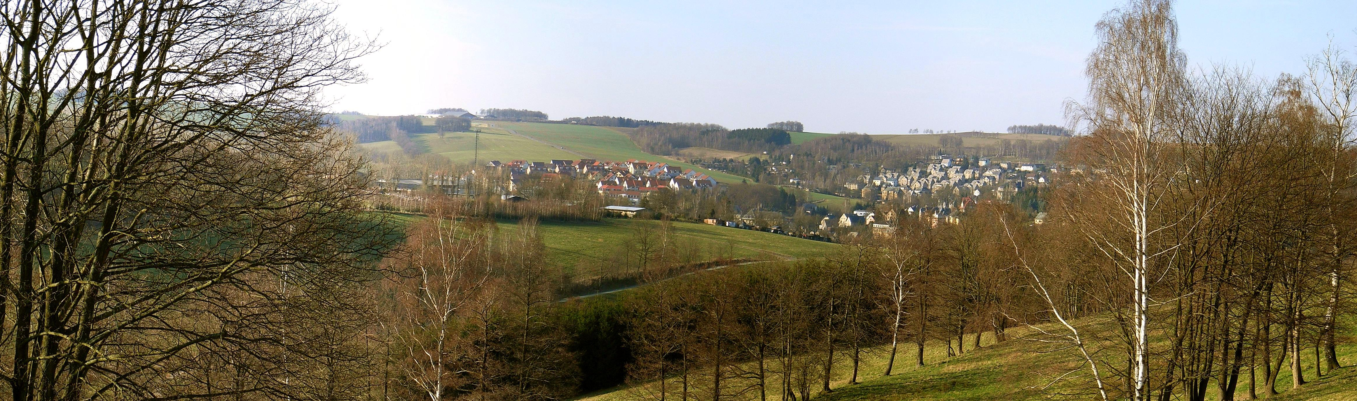 Panorama von Burkhardtsdorf (Sachsen)